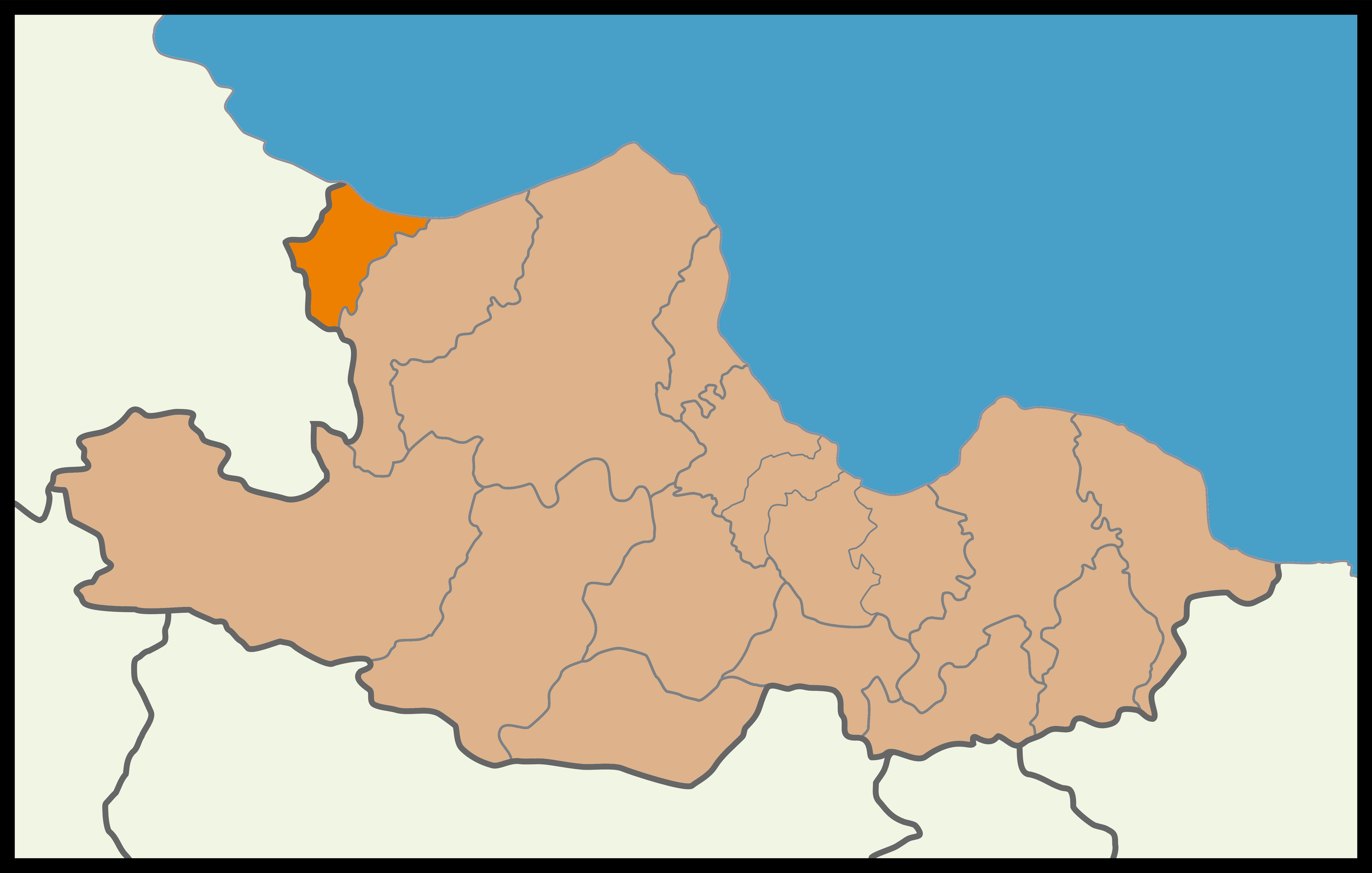 Samsun'un Yakakent ilçesinin 2014 Türkiye yerel seçimleri haritası.